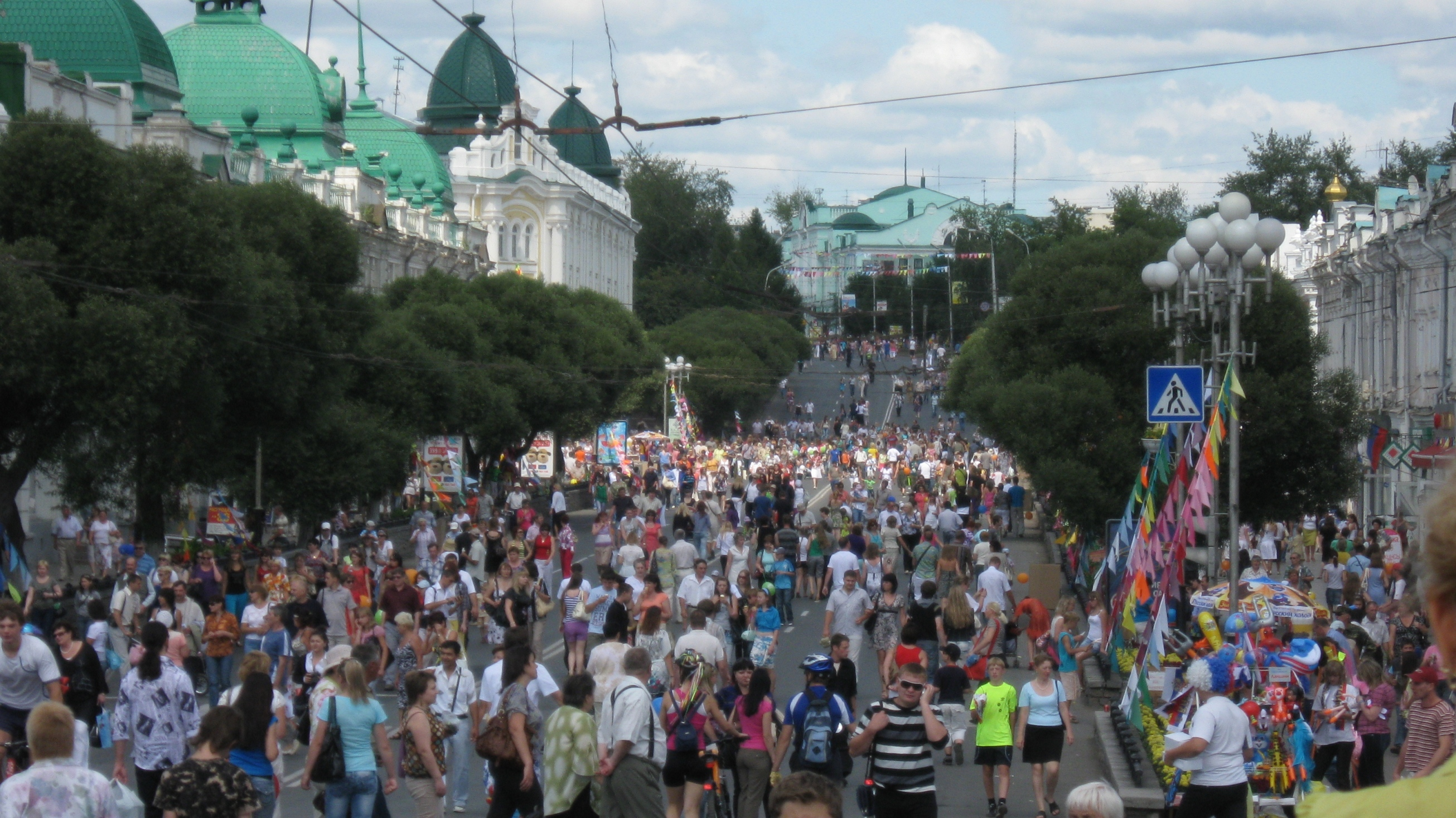 День города 2010. Омск, ул.Ленина (Любинский проспект)